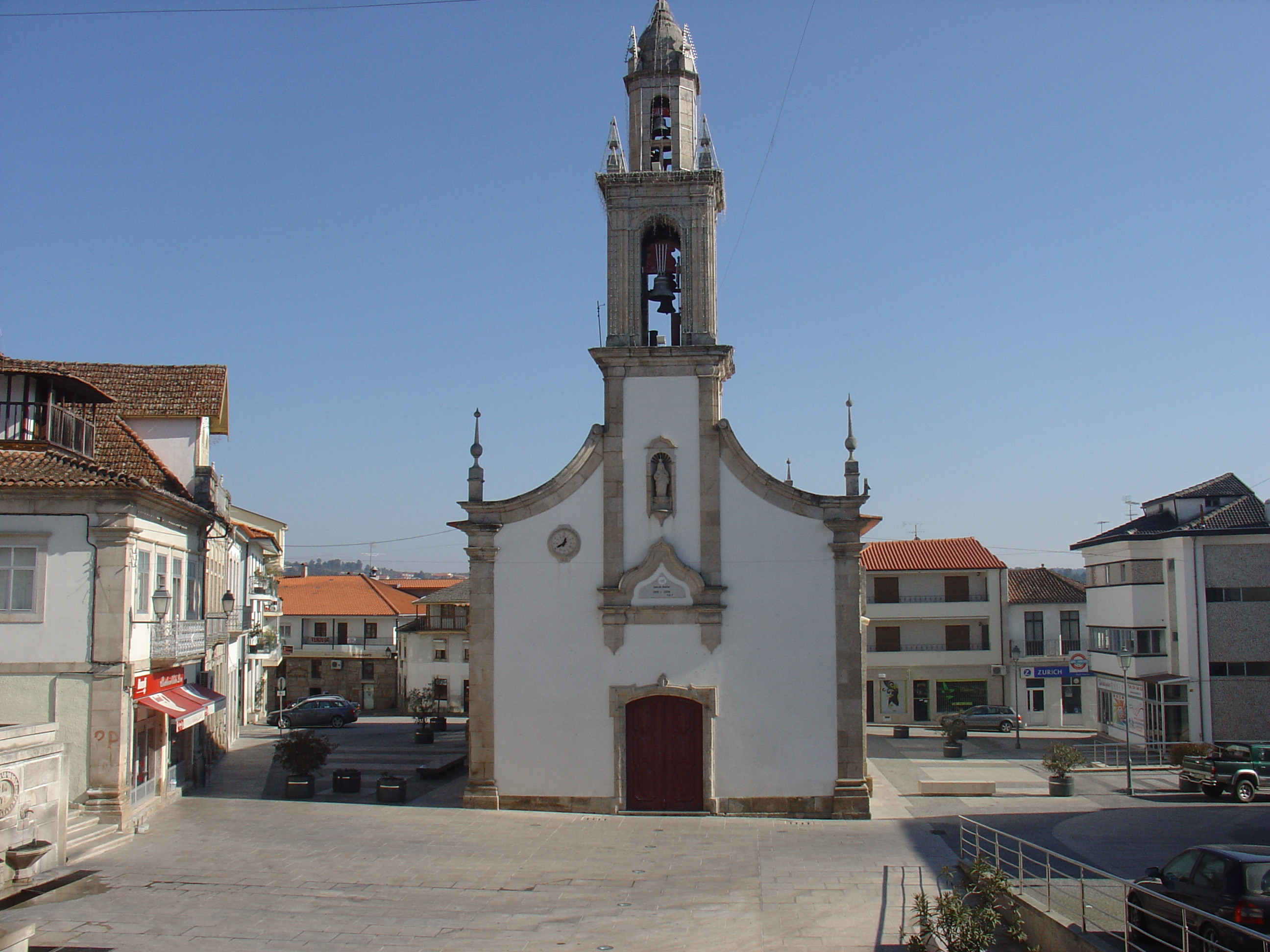 Igreja de Valpaços